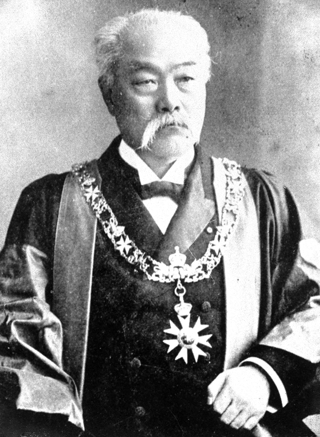 Portrait of Matsukata Masayoshi (松方正義, 1835 – 1924)